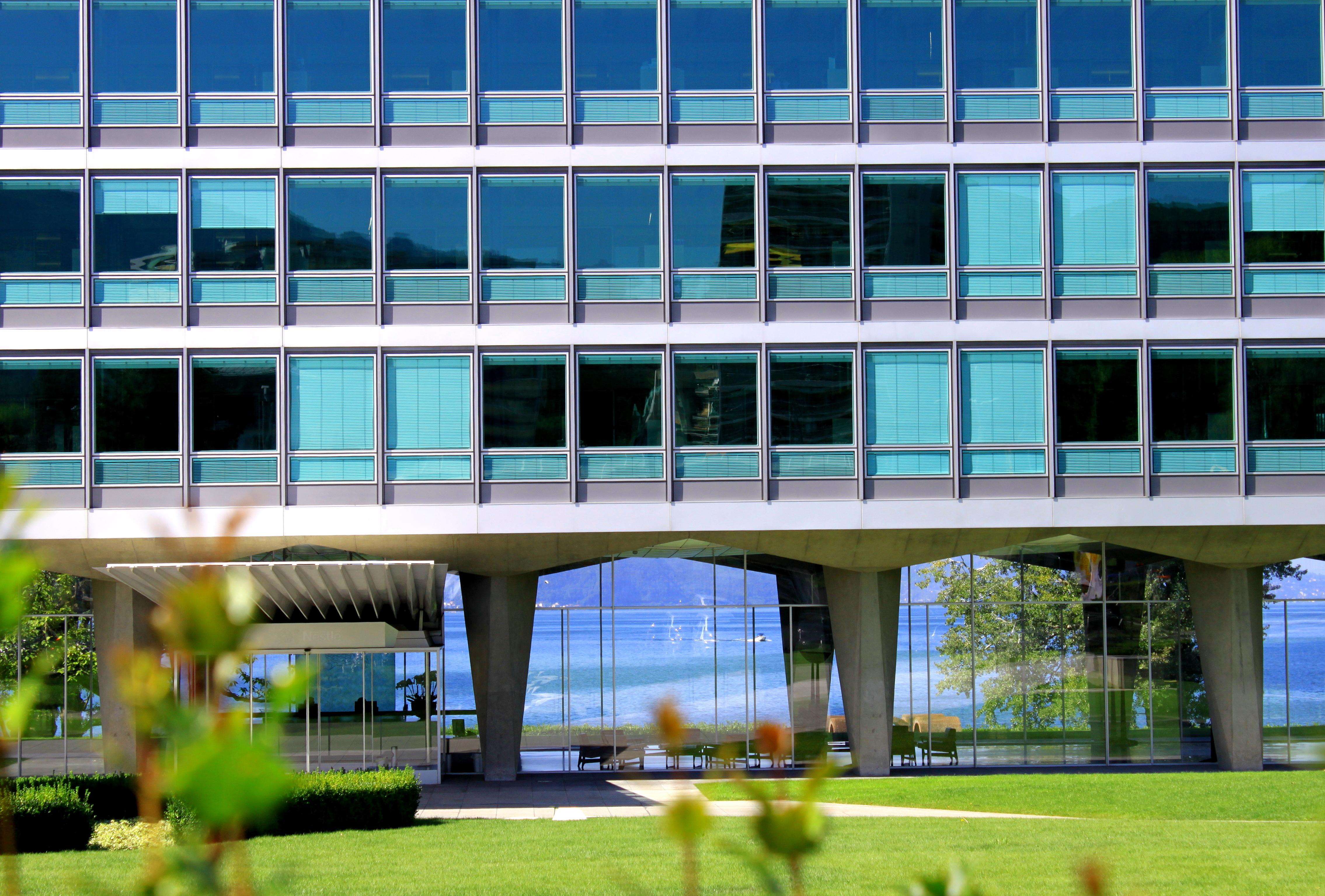 Suisse, canton de Vaud, Vevey, Bâtiment administratif et Archives Historiques de Nestlé SA.